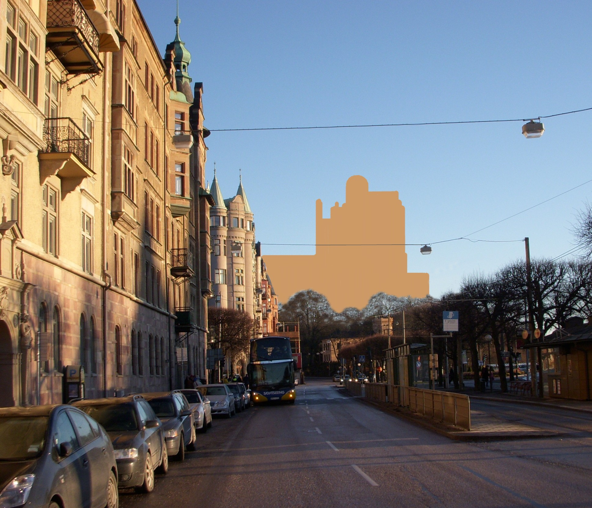 Strandvägen i Stockholm mot öst med siluetten för Nobelpalatset i fonden, fotomontage av Holger Ellgaard efter Ferdinand Bobergs perspektivritning.